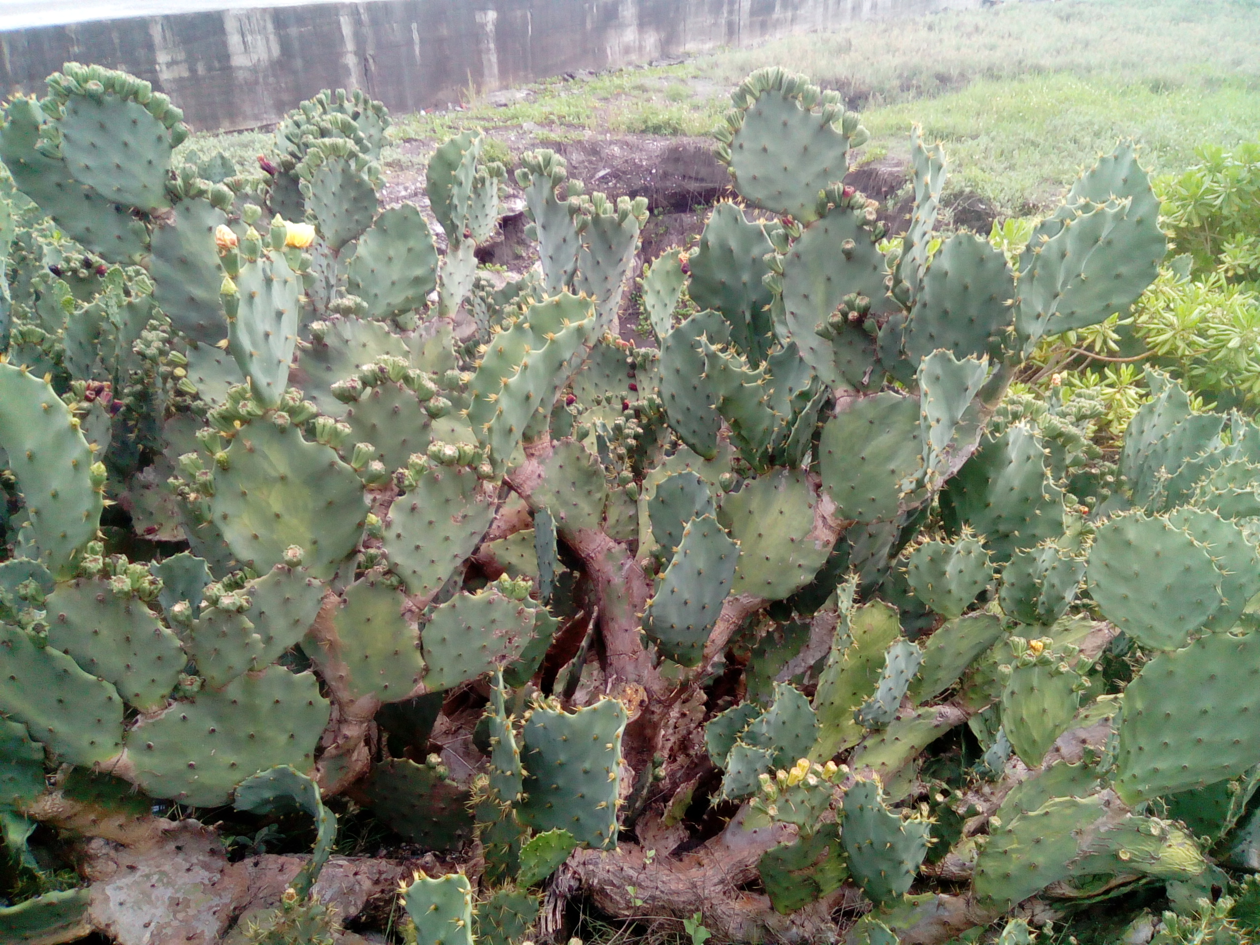 位於旗後砲台下方懸崖 穿過星光隧道可見